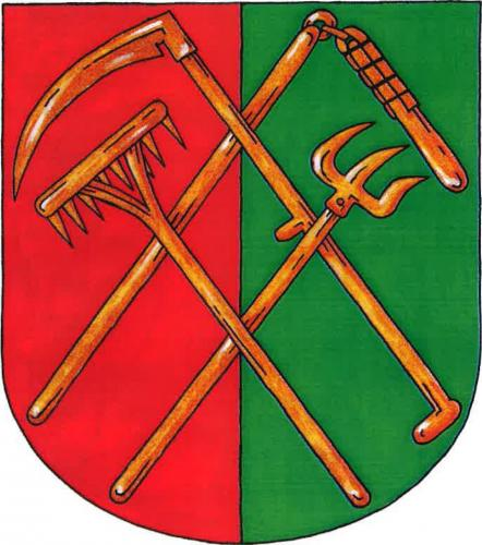 znak, Znětínek, okres Žďár nad Sázavou